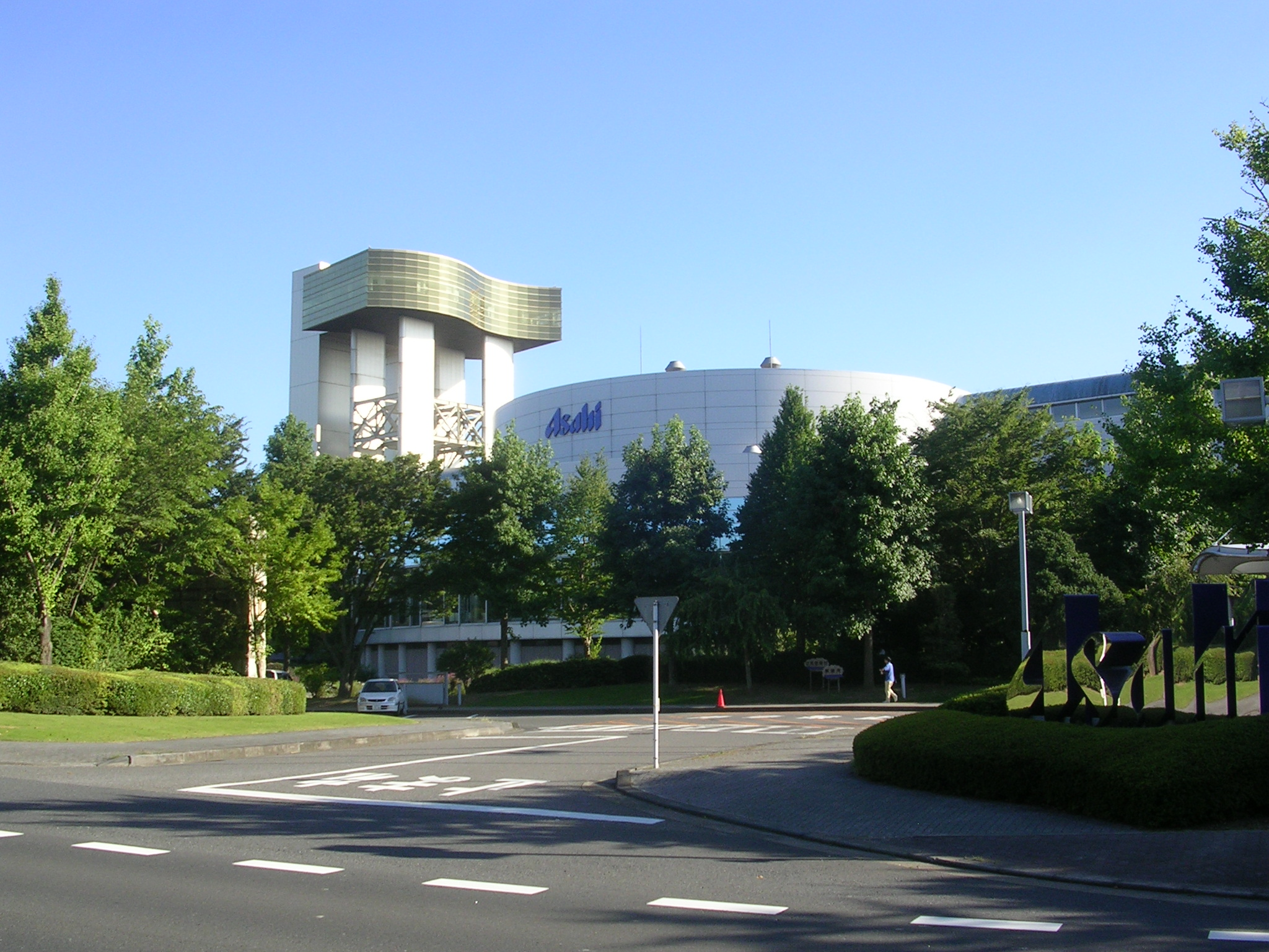 ASAHI BREWERIES, LTD., Ibaraki Brewerie (located in Moriya-shi, Ibaraki, Japan.)